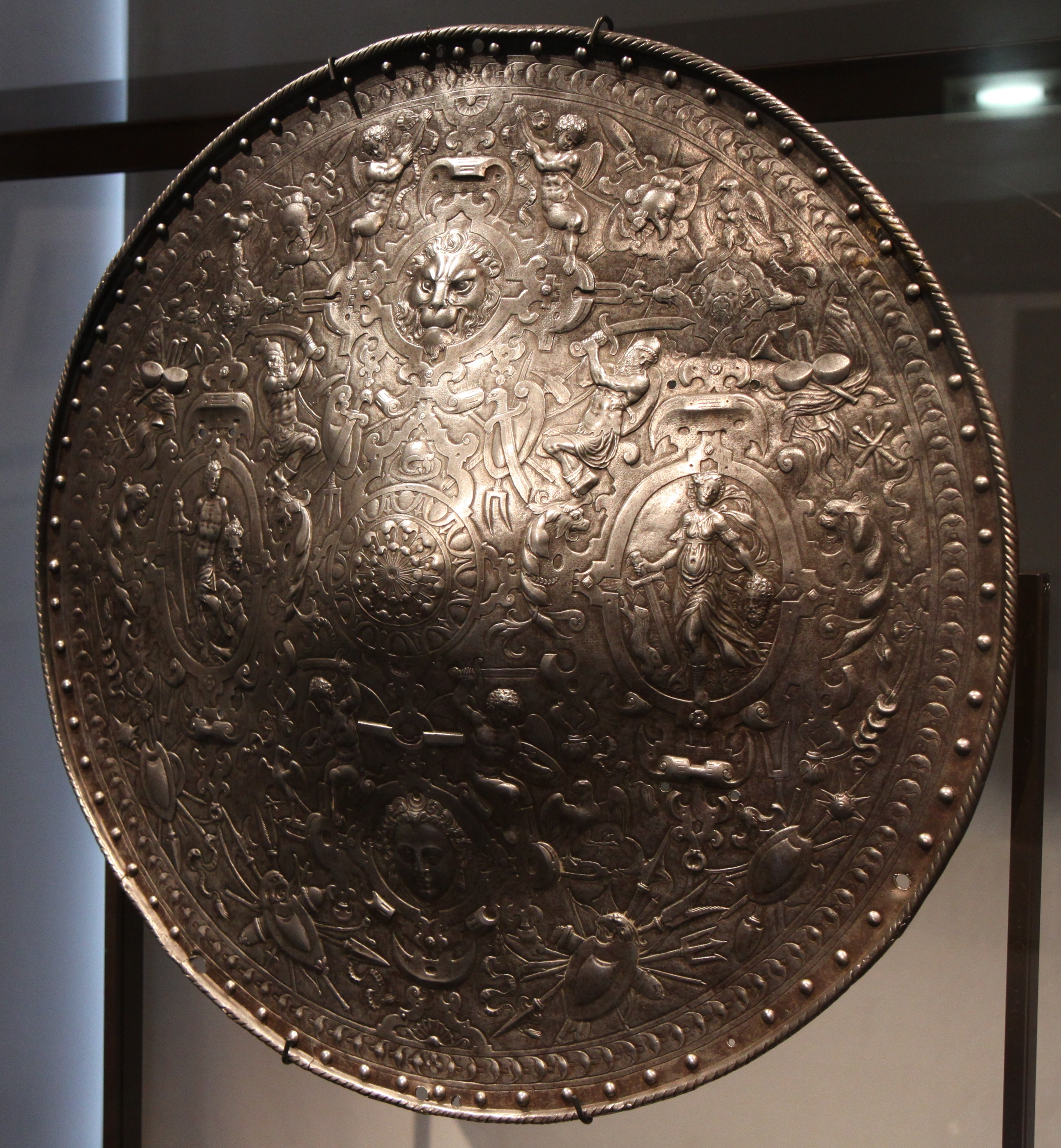 Rondache